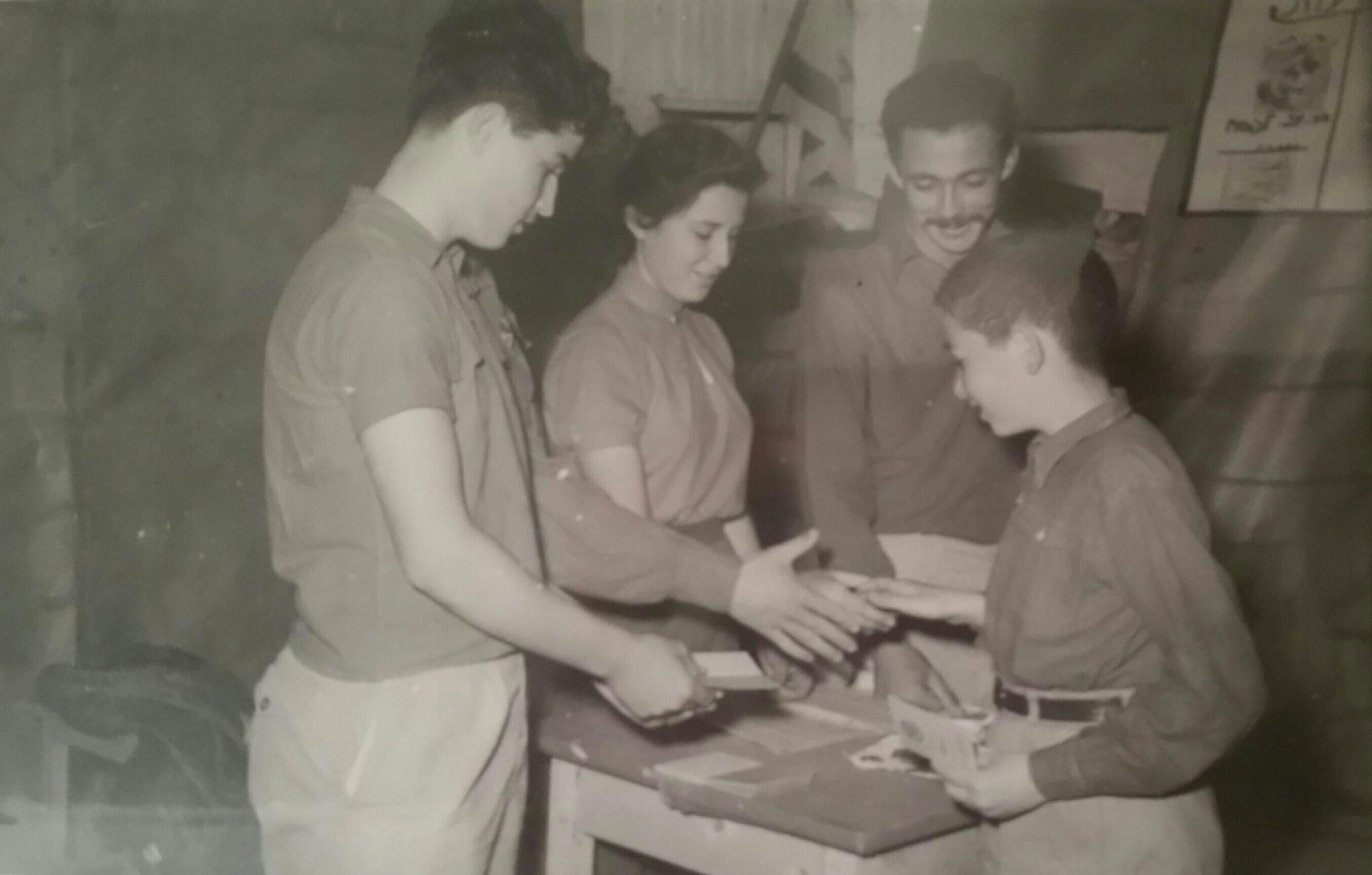 שבתי שביט בנערותו נקרא שבץ. משמאל מחלק תעודות בחג המעלות בנוער העובד בעיר נשר.השני מימין הוא אורי הלברון. מימין הילד מקבל התעודה הוא אילן רוזנצווייג